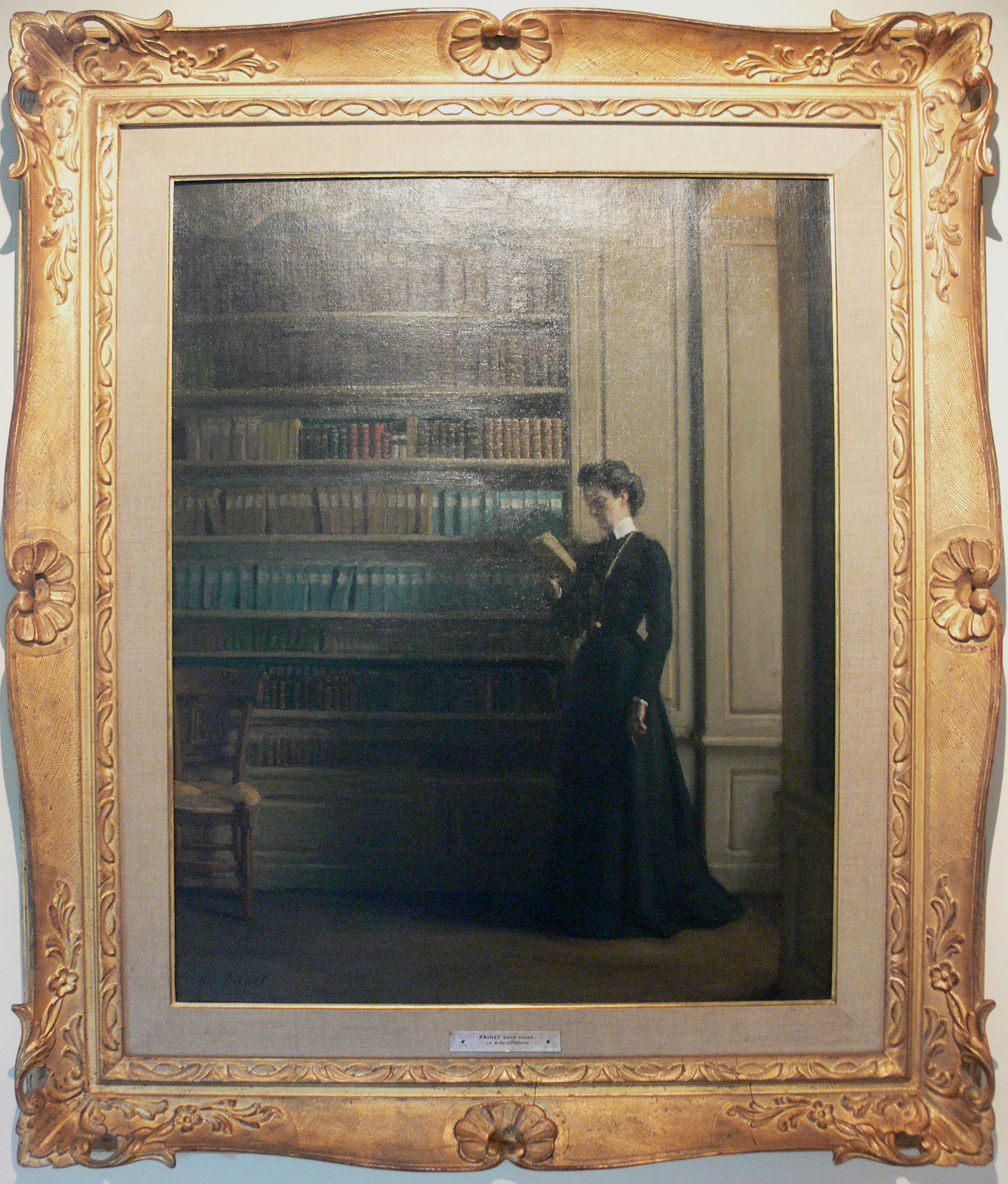 René-Xavier Prinet, La Bibliothèque, vers 1906. Huile sur toile, vers 1906, Vesoul, musée Georges-Garret